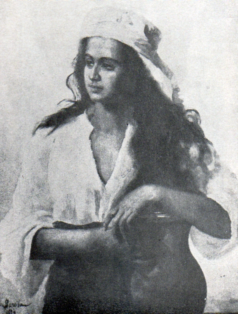 Nostalgie - portretul verșoarei lui Octav Băncilă - Victoria